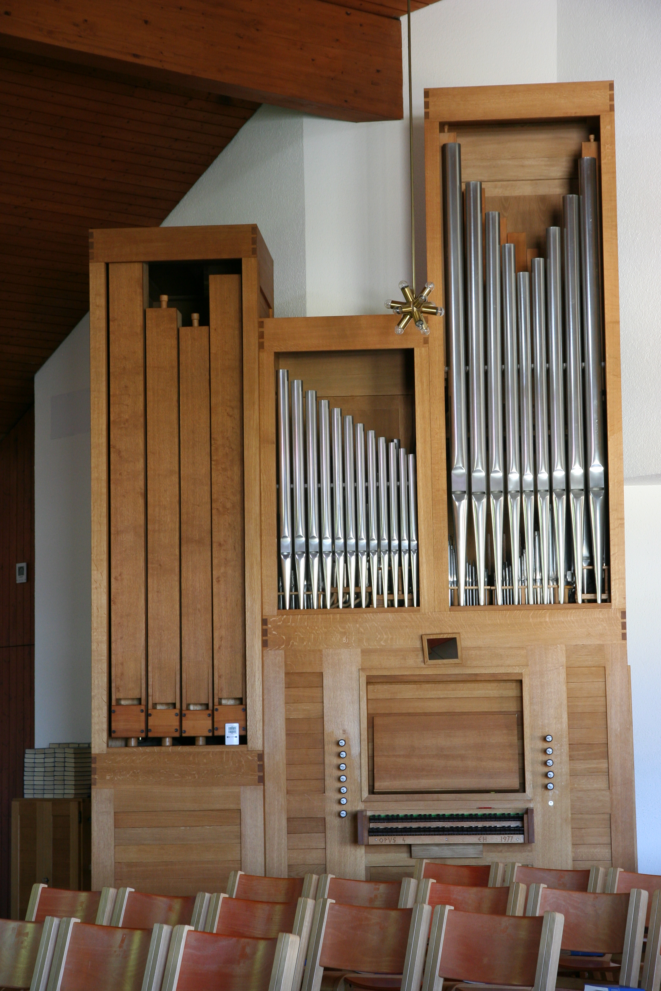 Römisch-katholische Pfarrkirche Herz Jesu Hausen am Albis, Orgel